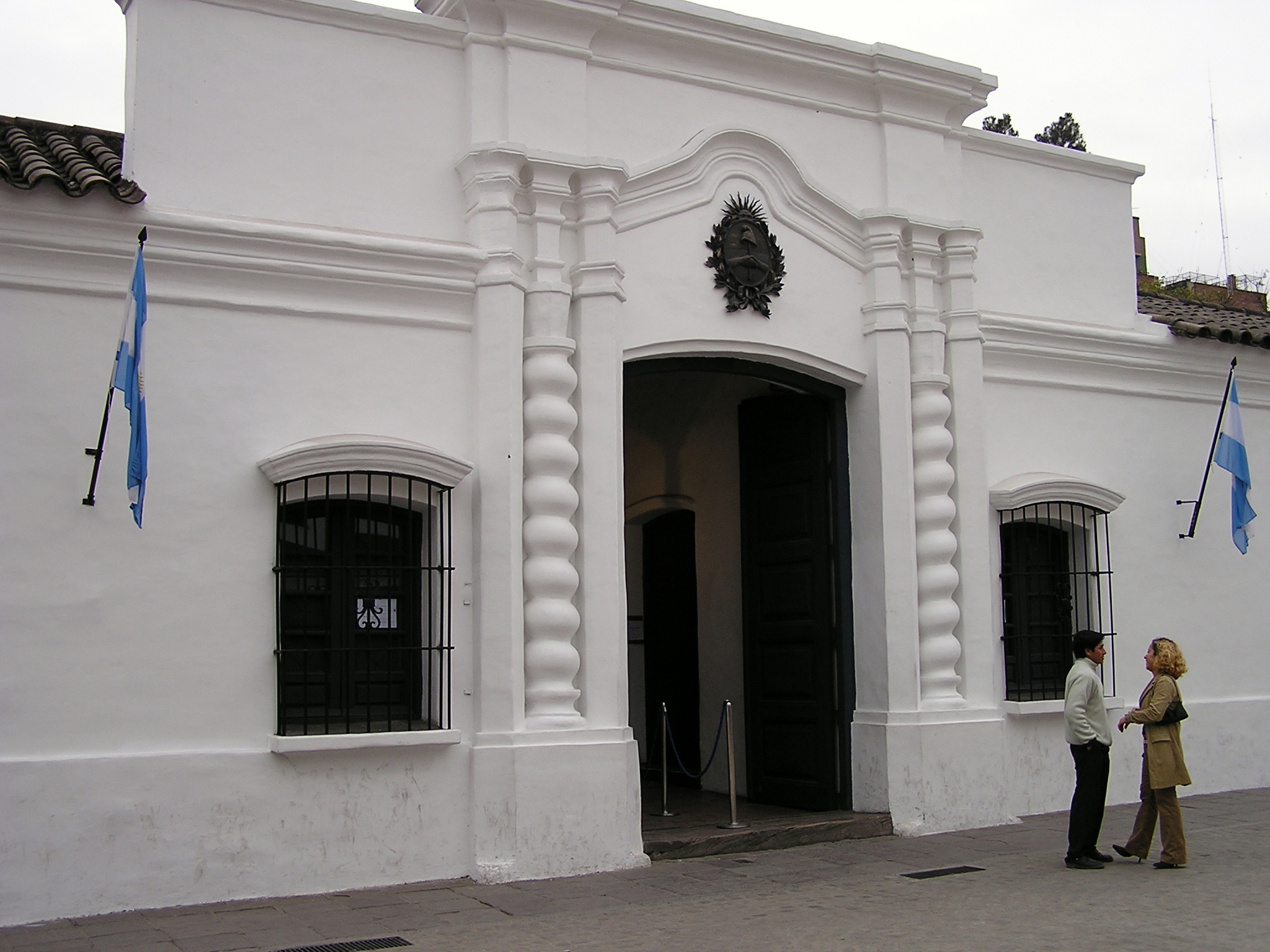 Frente de la Casa de Tucumán